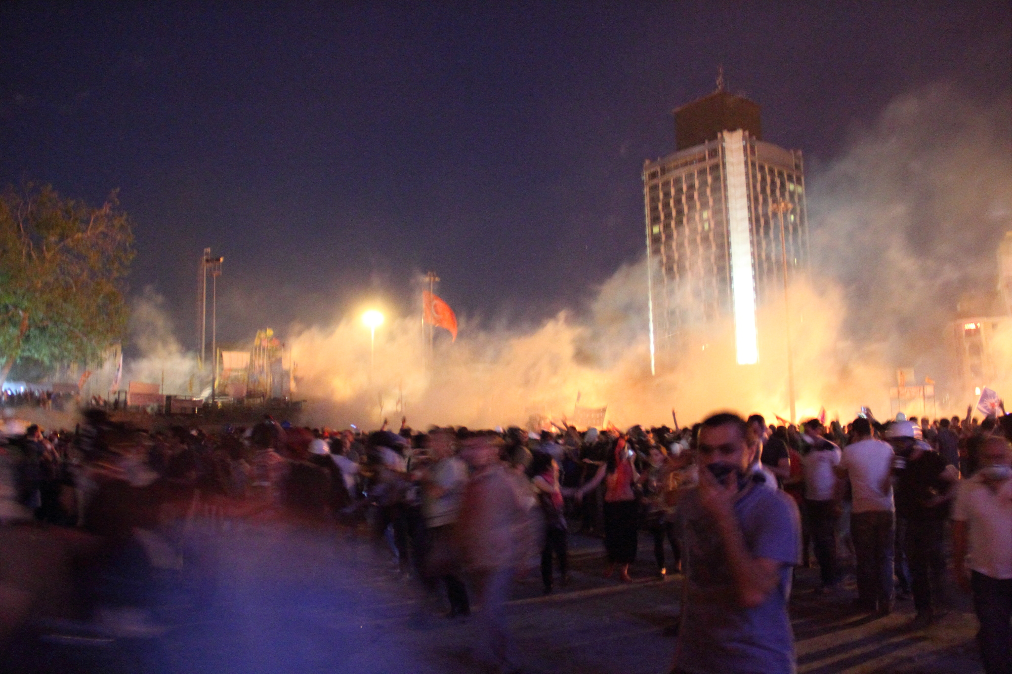 Gezi Parkı Müdahale